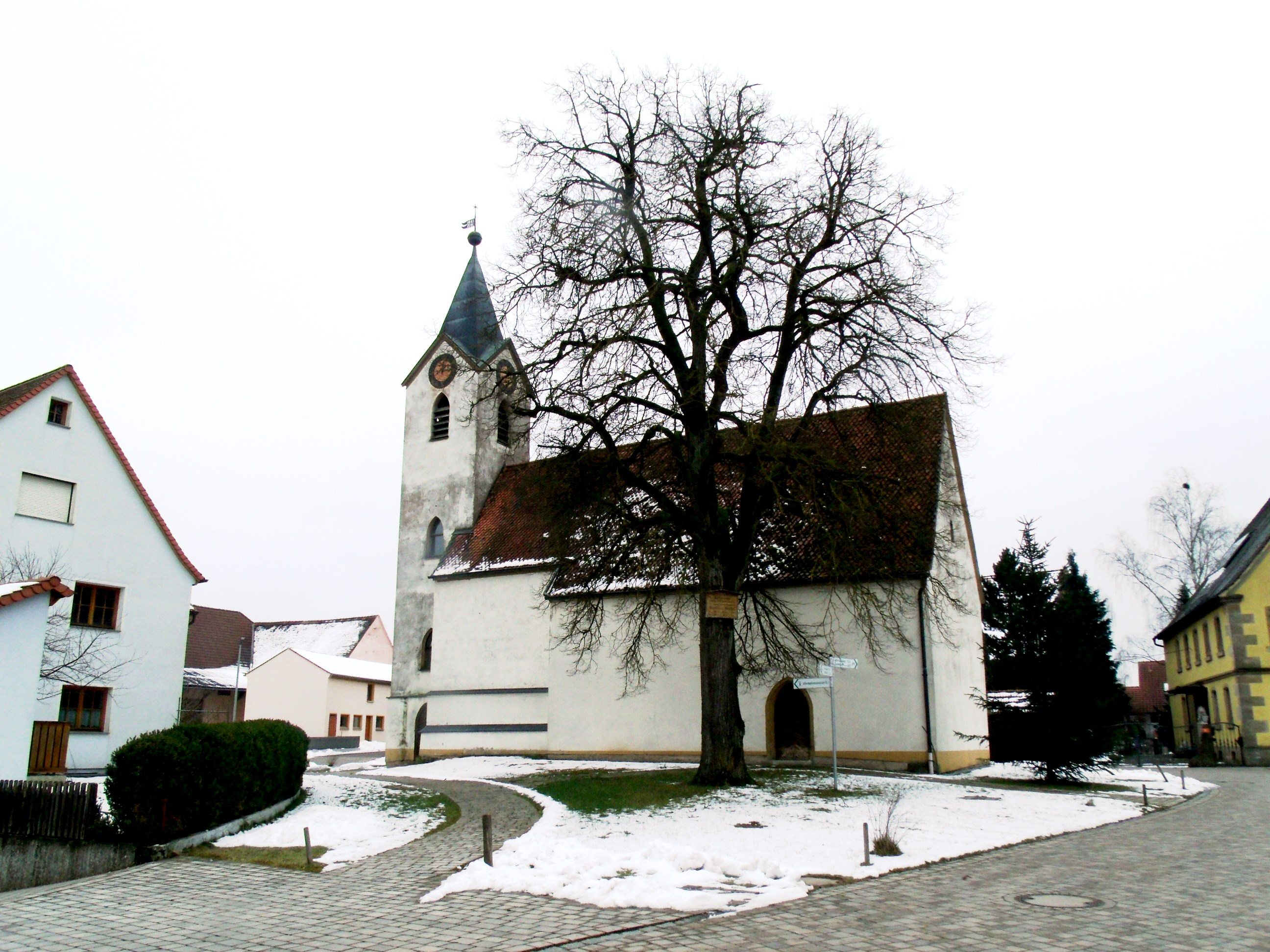 Leidendorf, Ortsmitte mit der Evangelisch-lutherischen Kirche St. Peter und Paul und mit der Schiller-Linde